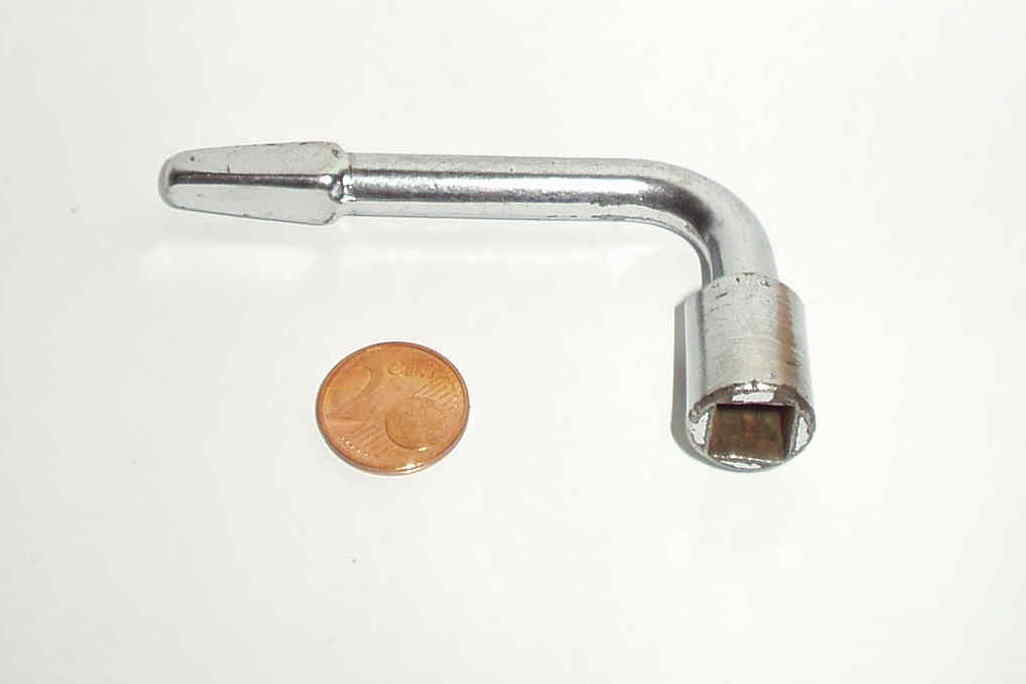 Wagenschlüssel, Vierkant-Schlüssel für Bahnwagen nach UIC-Vorgaben.